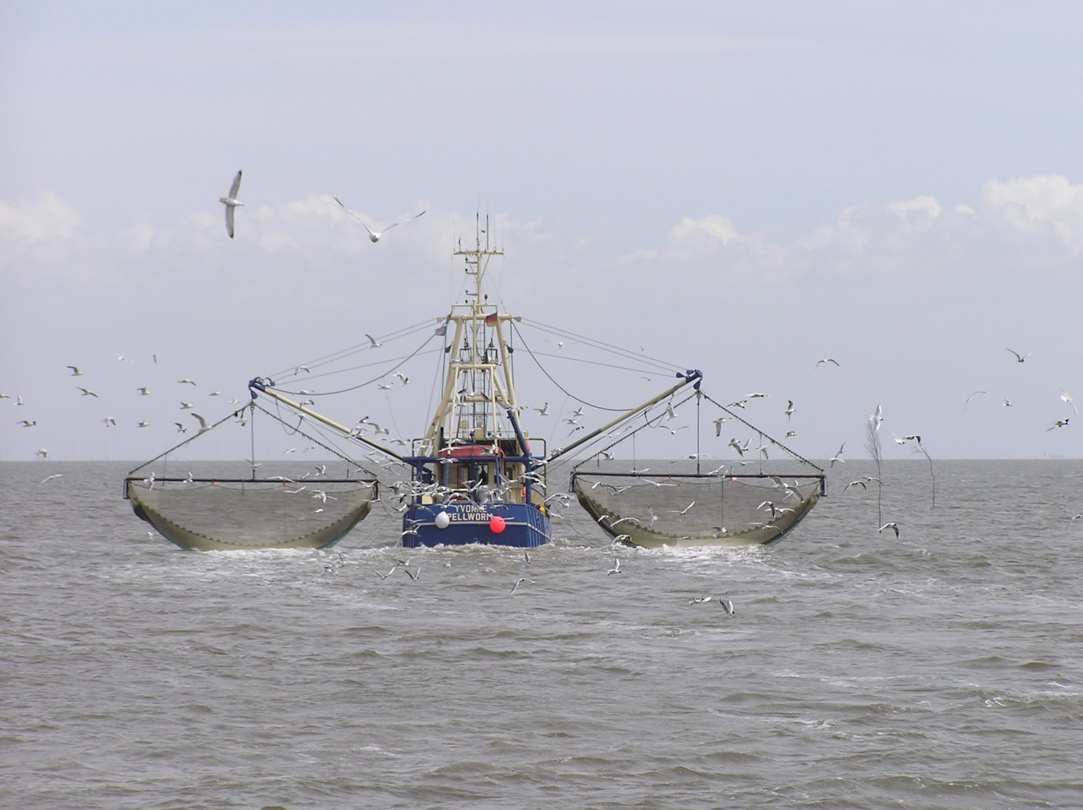 Krabbenkutter Ivonne/Pellworm bei Südfall